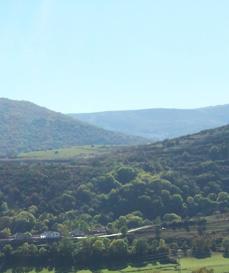 Los Lagos desde el pueblo de Abiada